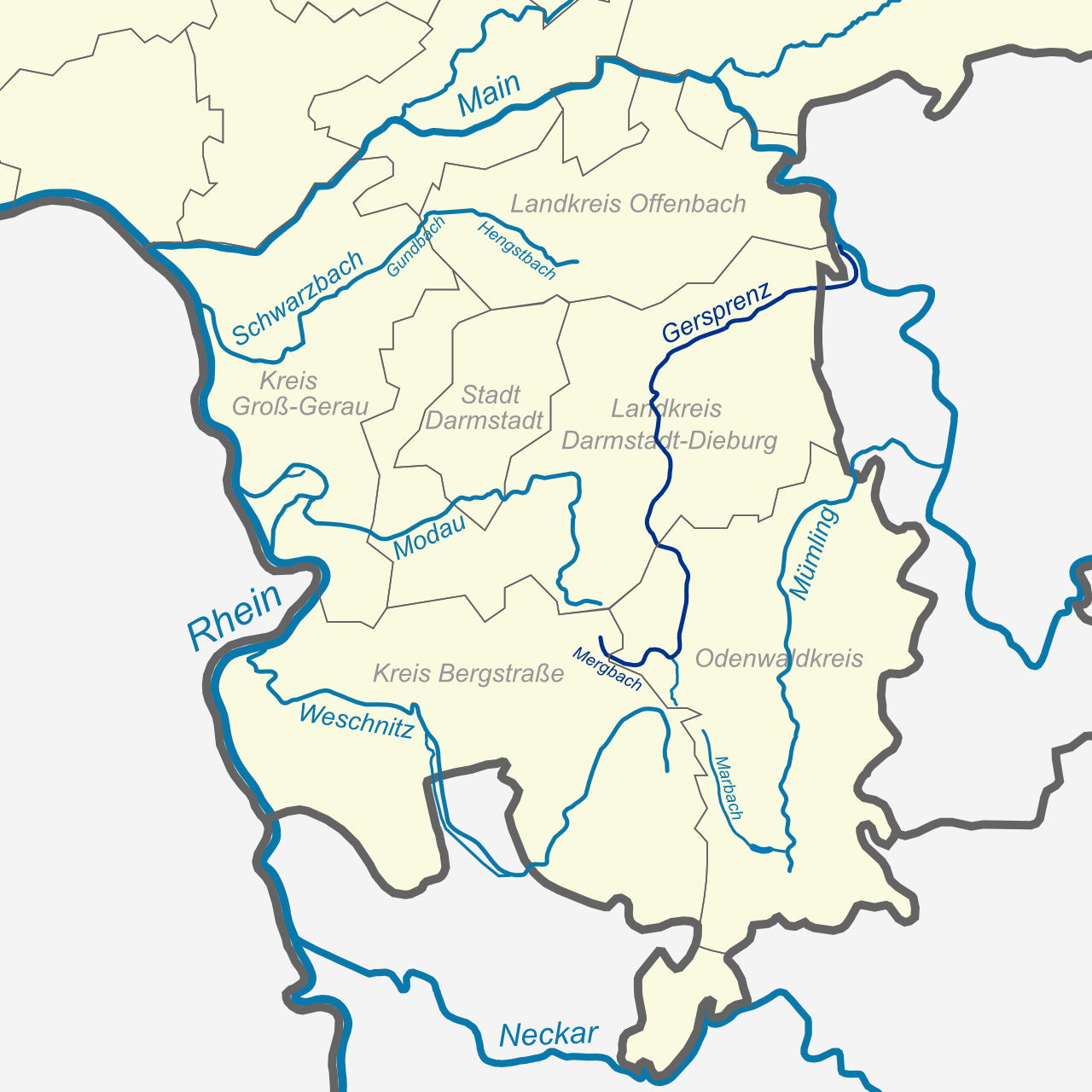 Verlaufskarte der Gersprenz in Südhessen